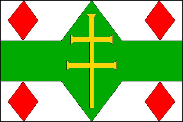 Vlajka obce Švábov